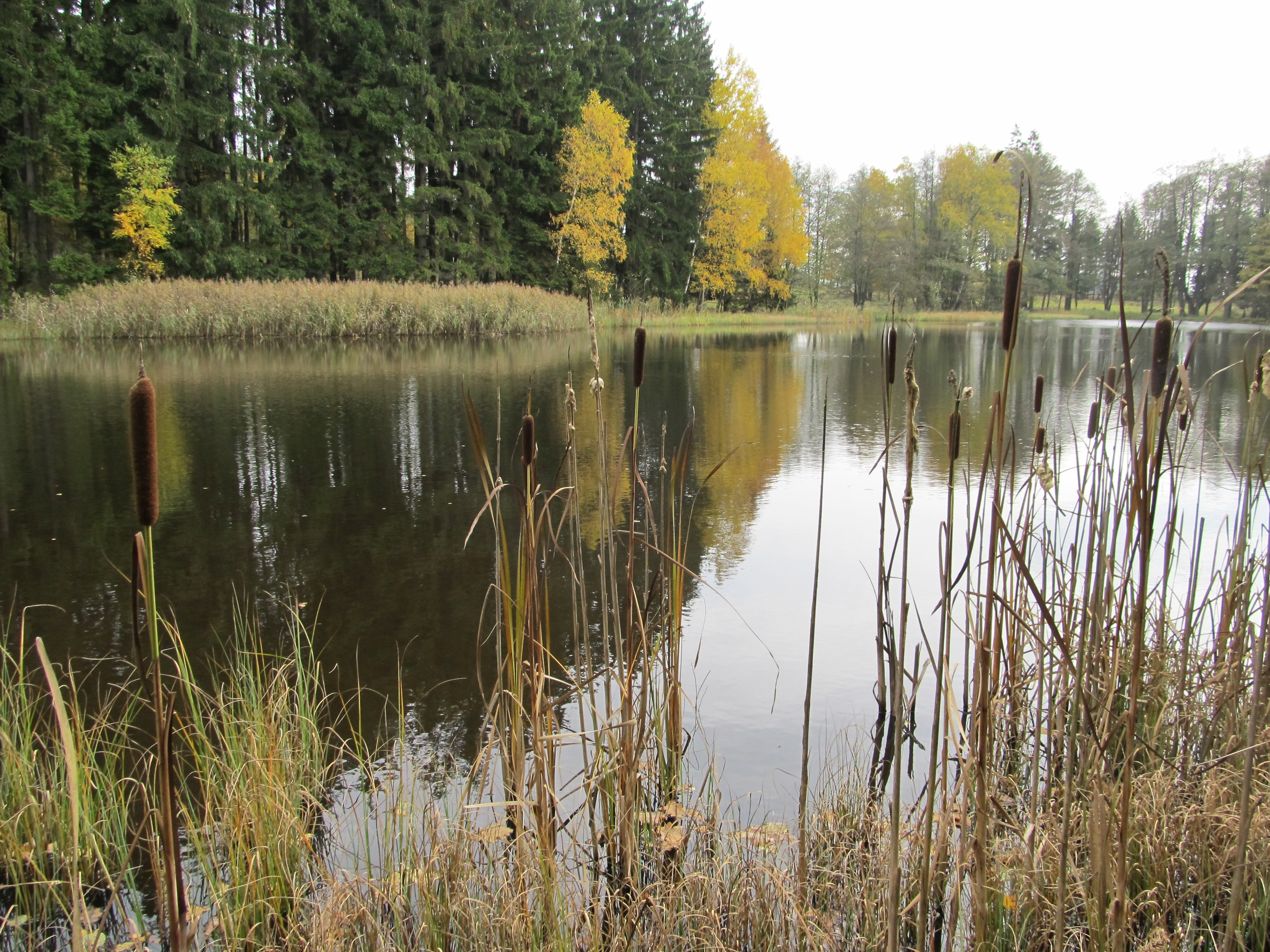 Přírodní památka Šilhánky - pohled na dolní rybník